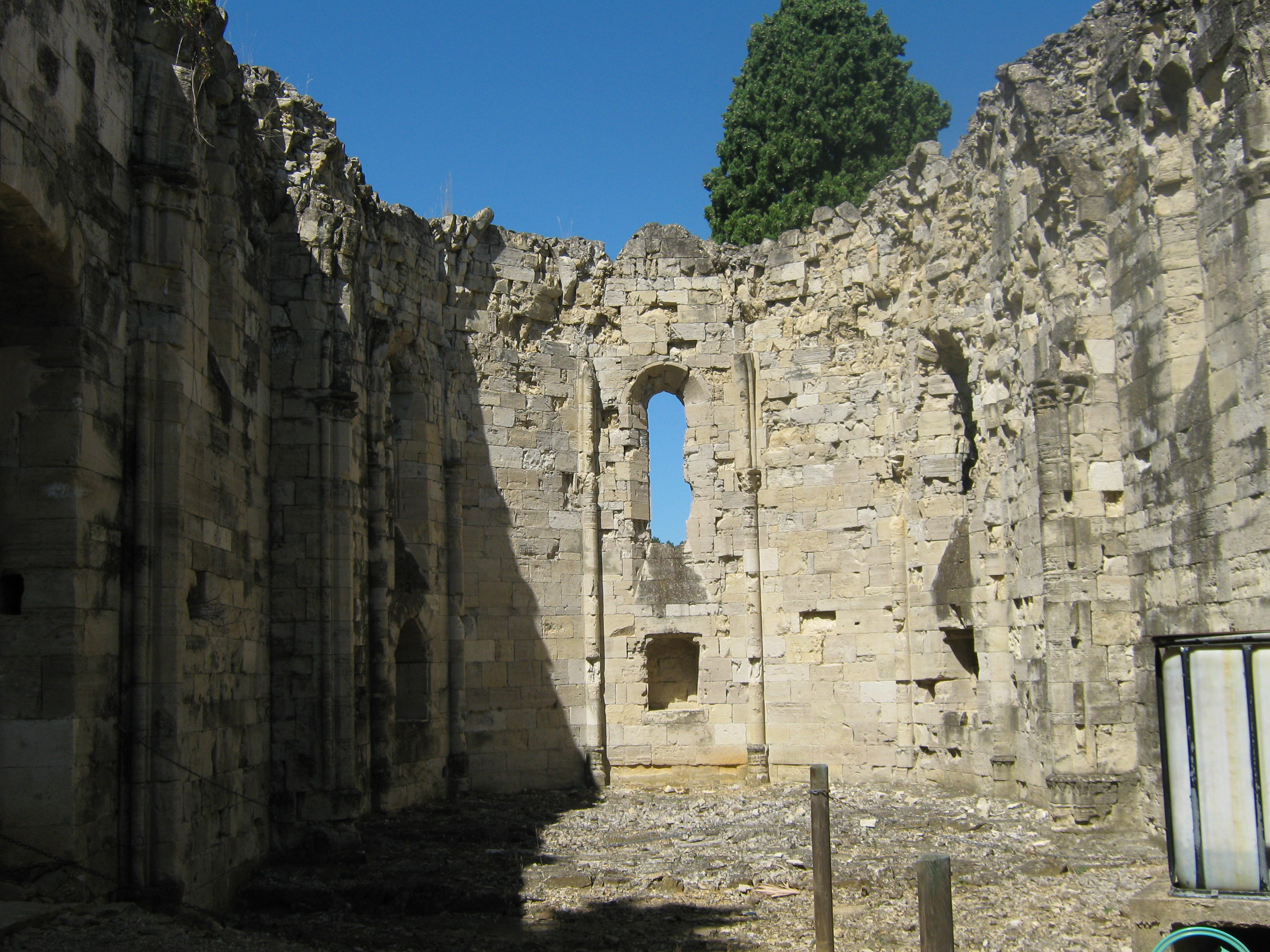 Vista del nau